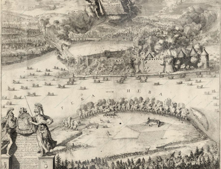 Belagerung der Festung Schlüsselburg (Nöteborg) 11. Oktober 1702. Ein Nachdruck aus der zweiten Hälfte des XVIII. Jahrhunderts